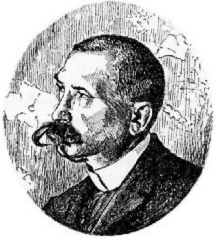 Heinrich Egersdörfer (1853-1915)